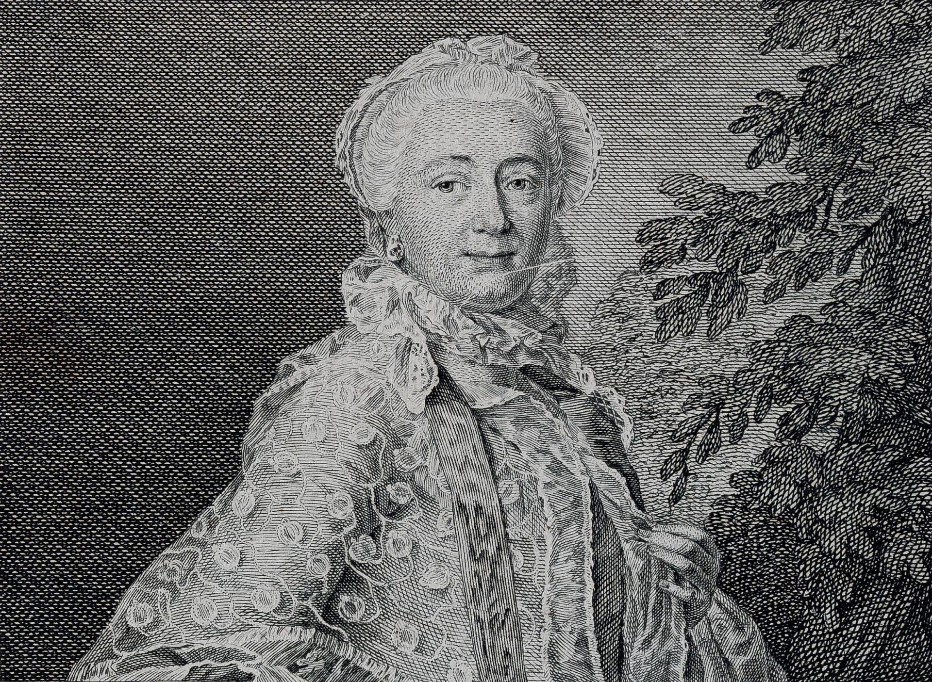 Графиня Мария Аврора Лесток, ур. фон Менгден (1720—1808)